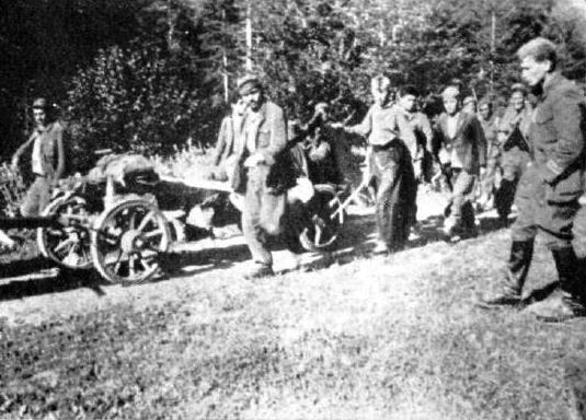 Premik ruskega bataljona na Notranjskem avgusta 1944 Na desni komandant Prešernove brigade Rudolf Hribernik-Svarun.